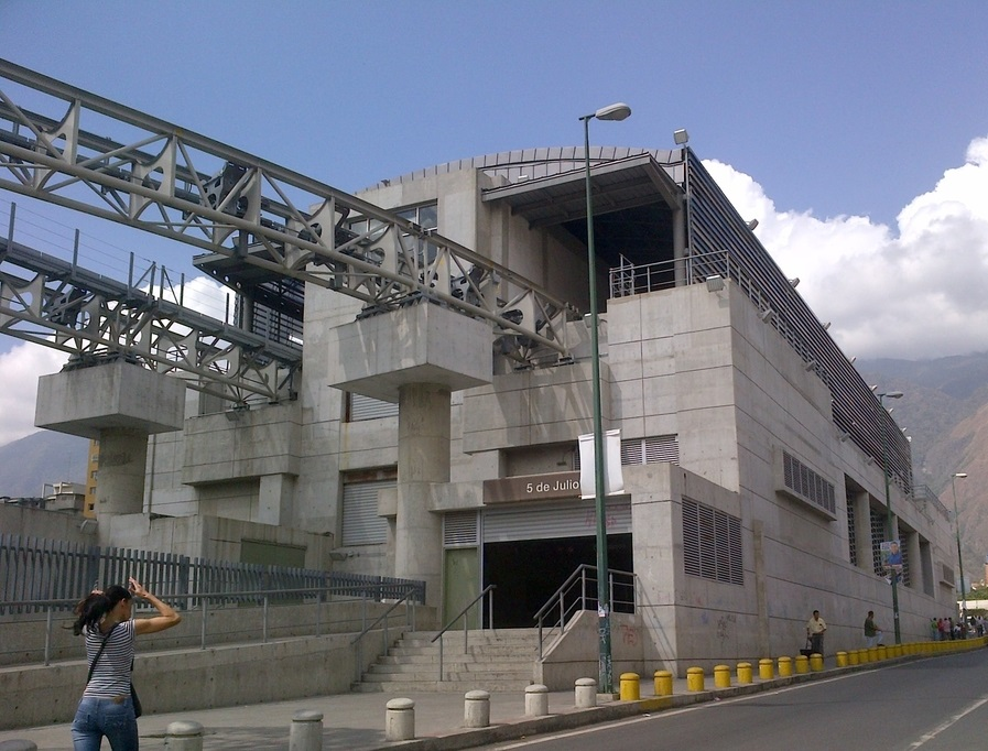 Cabletren bolivariano Petare Caracas Station July 5